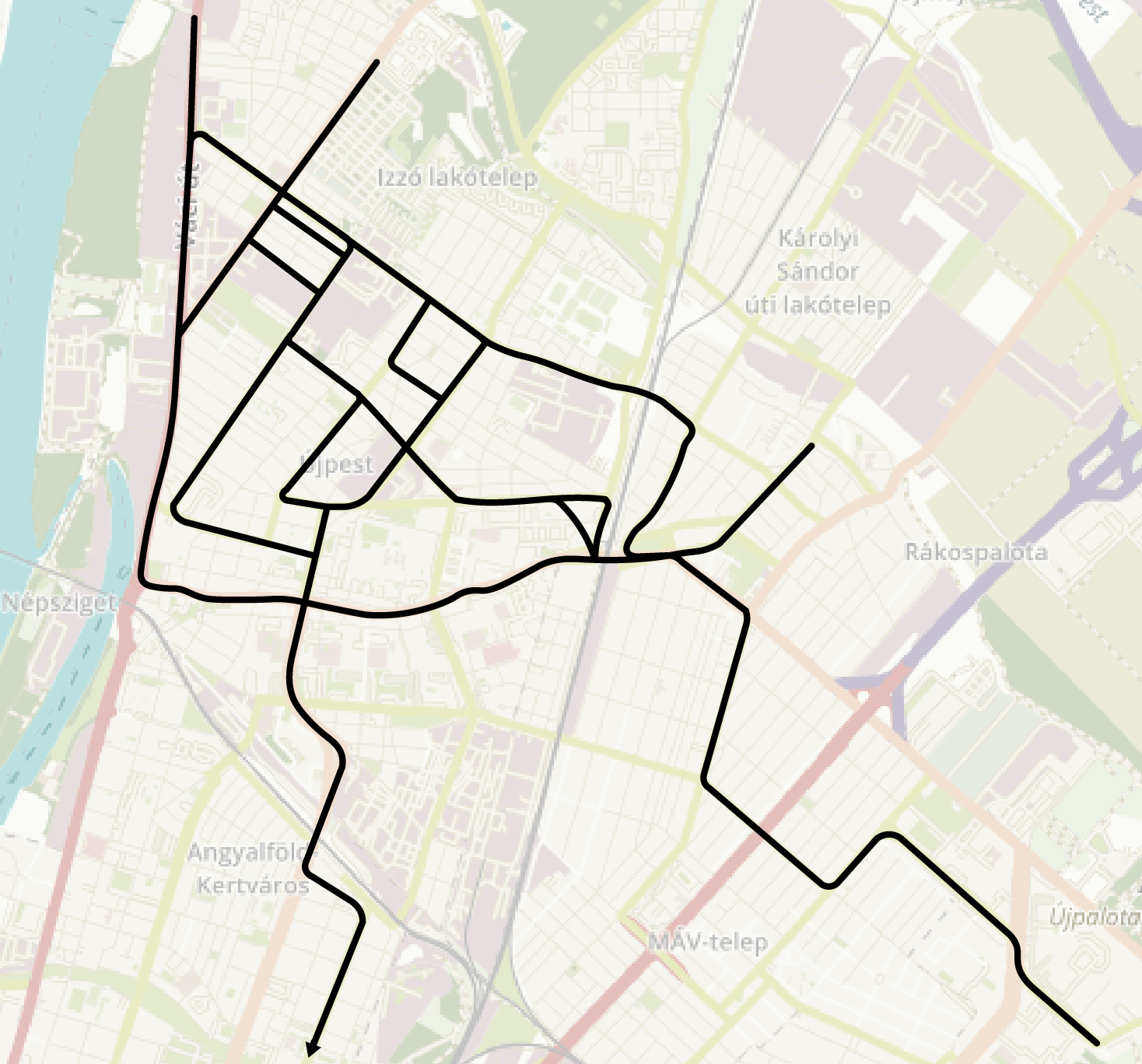 Az 1976-ban Újpestre tervezett trolihálózat This map may be incomplete, and may contain errors. Don't rely solely on it for navigation.